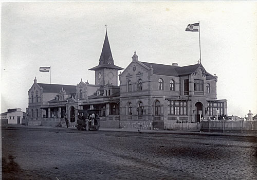 Der alte kaiserliche Bahnhof um 1907 in Swakopmund - Deutsch-Suedwestafrika - heute Namibia. Der Bahnhof aus der Kolonialzeit steht noch heute in Swakopmund.